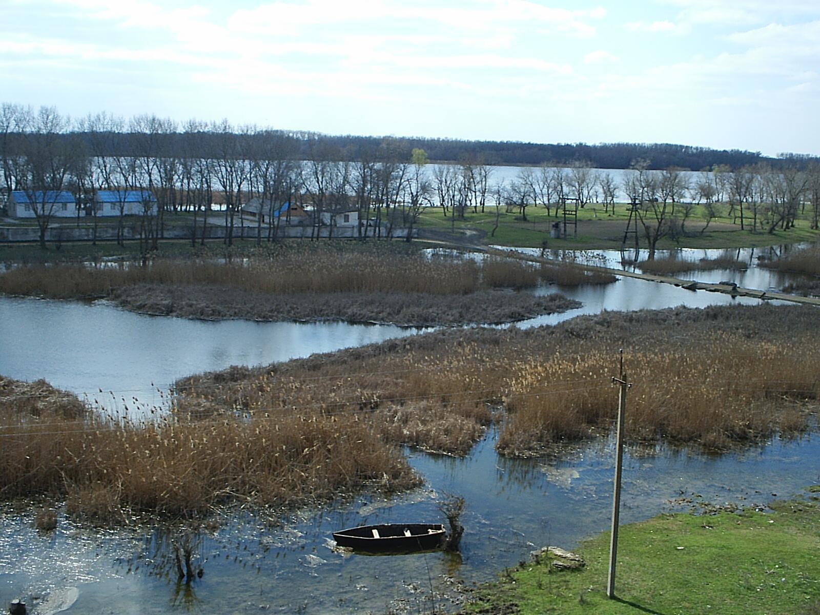 Весенний разлив